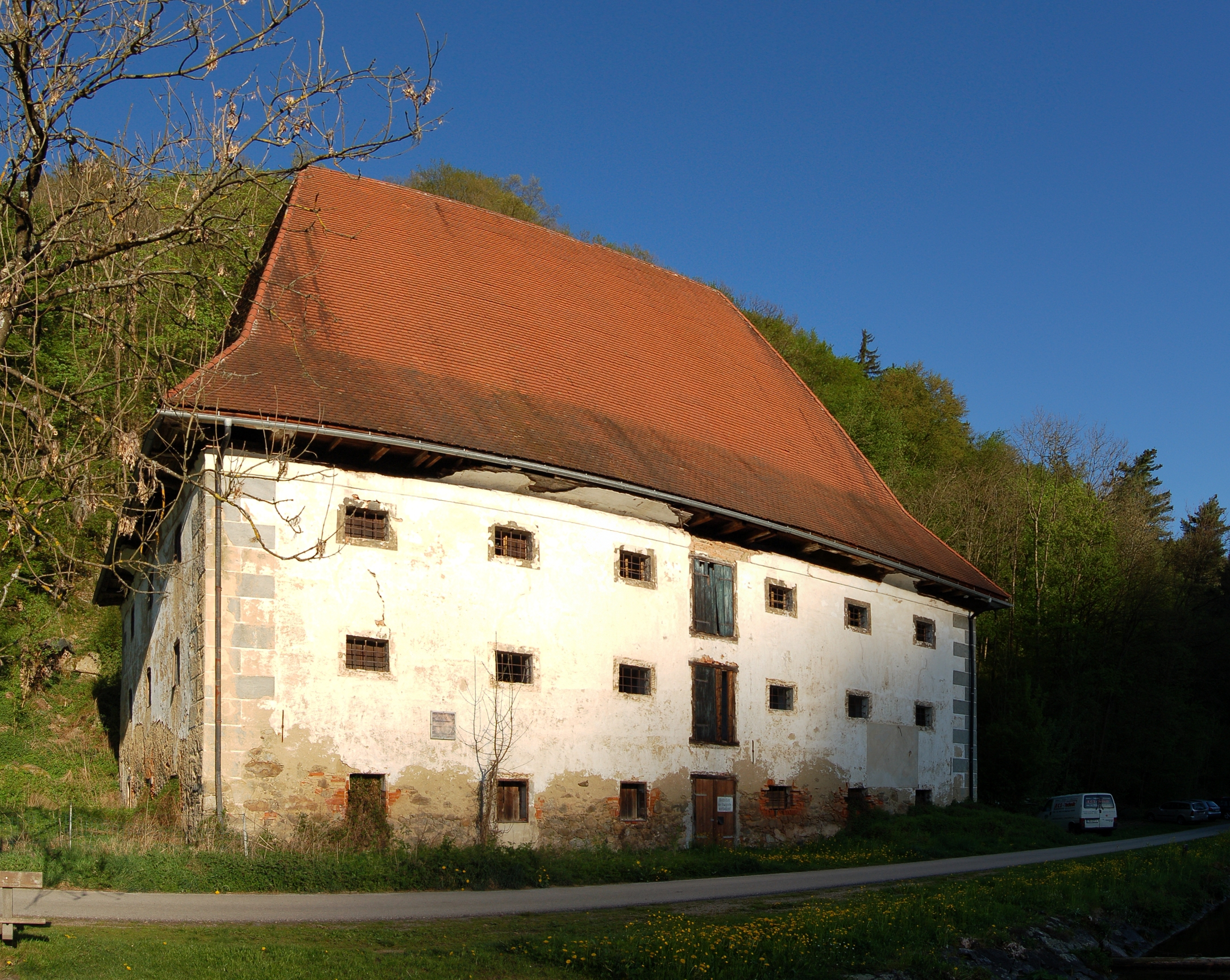 Der Freyer-Körnerkasten in Obermühl ist ein ehemals viergeschoßiger, heute dreigeschoßiger Bau am Donauufer. Der mit der Jahreszahl 1618 bezeichnete Körnerkasten besitzt ein angestiftetes Walmdach, gemalte und geritzte Fensterrahemen sowie Eckquaderung in Stufenputz.